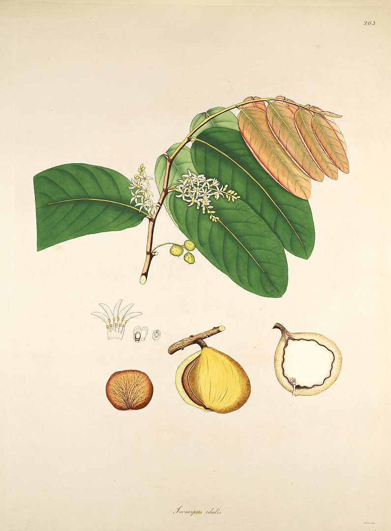 Гаїтянський каштан